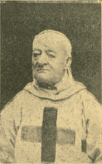 Mieczysław Steiner. Last Trinitarian of Lutsk.